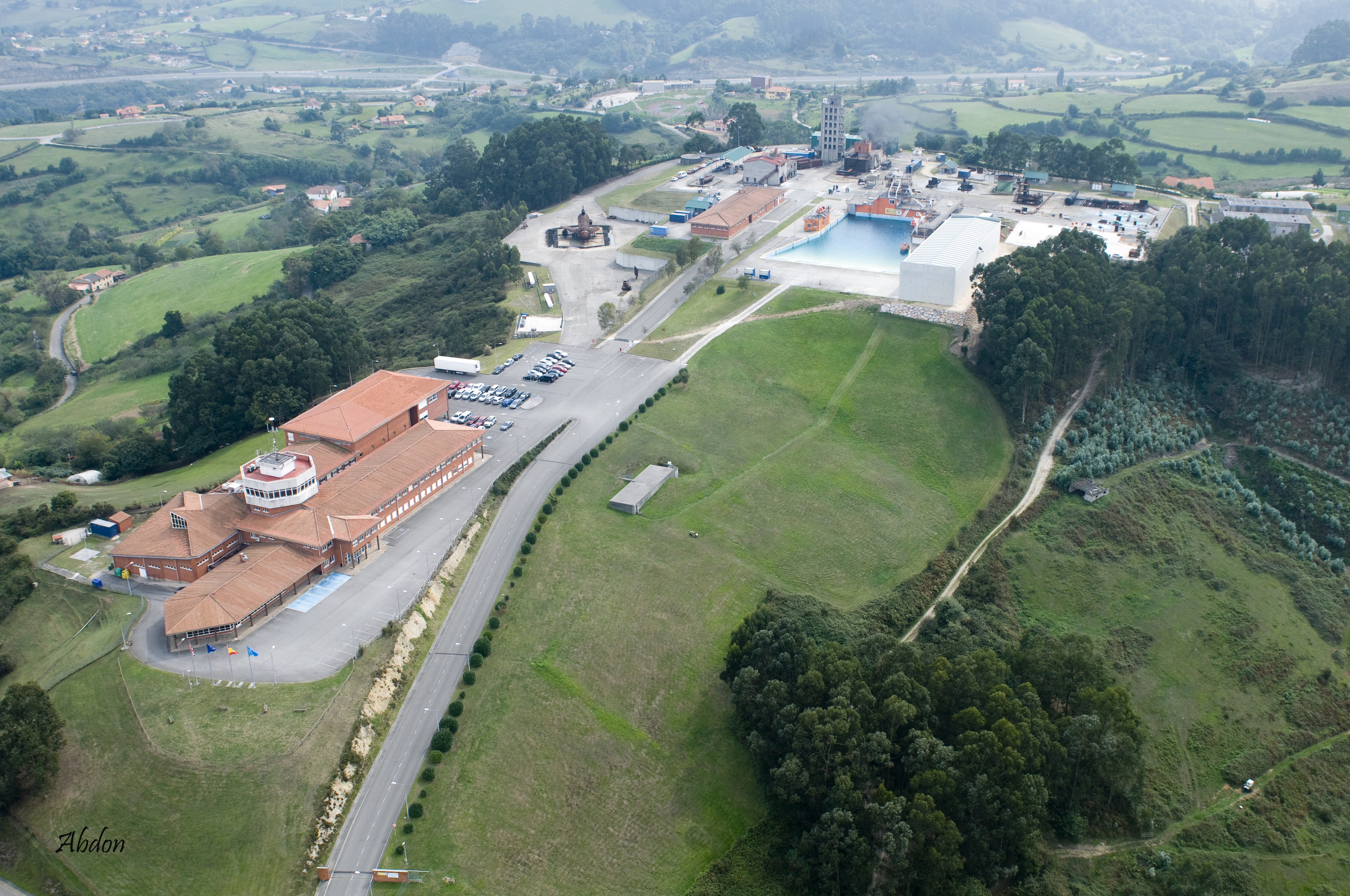 Instalaciones Centro Jovellanos